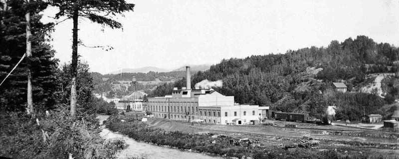 L’usine de pâte à papier East Canada Power & Pulp, bâtie par Rodolphe Forget au tournant du 20ième siècle à La Chute Nairne (La Malbaie, aujourd’hui Clermont) Photo Donat Girard, vers 1920 Musée de Charlevoix, collection Georges Fournier